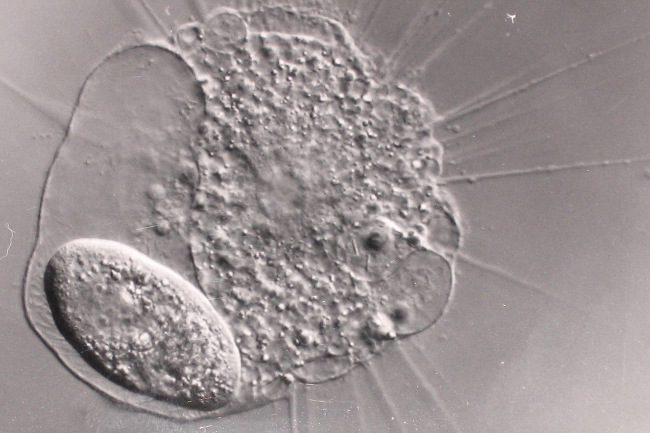 In der Nahrungsvakuole eines Sonnentierchens (Heliozoa) eingeschlossenes Paramecium - (Lichtmikroskopie, DIK) Differential-Interferenz-Kontrast